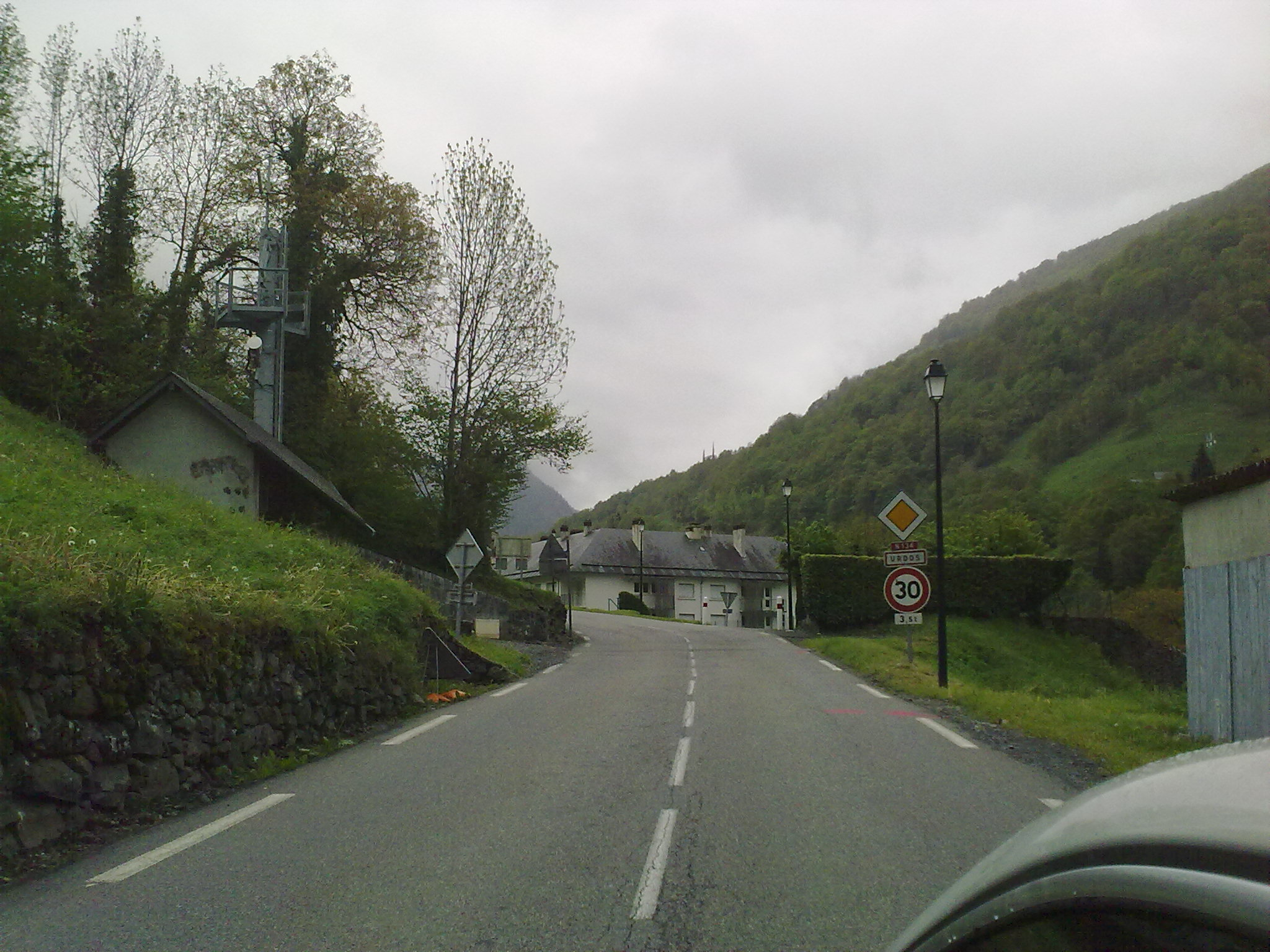 Urdos, France